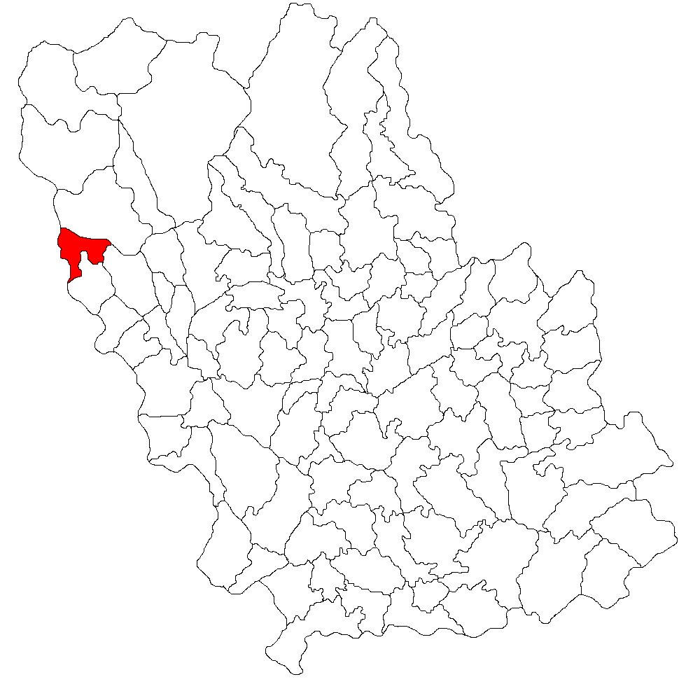 Categorie:Hărţi ale judeţului Prahova